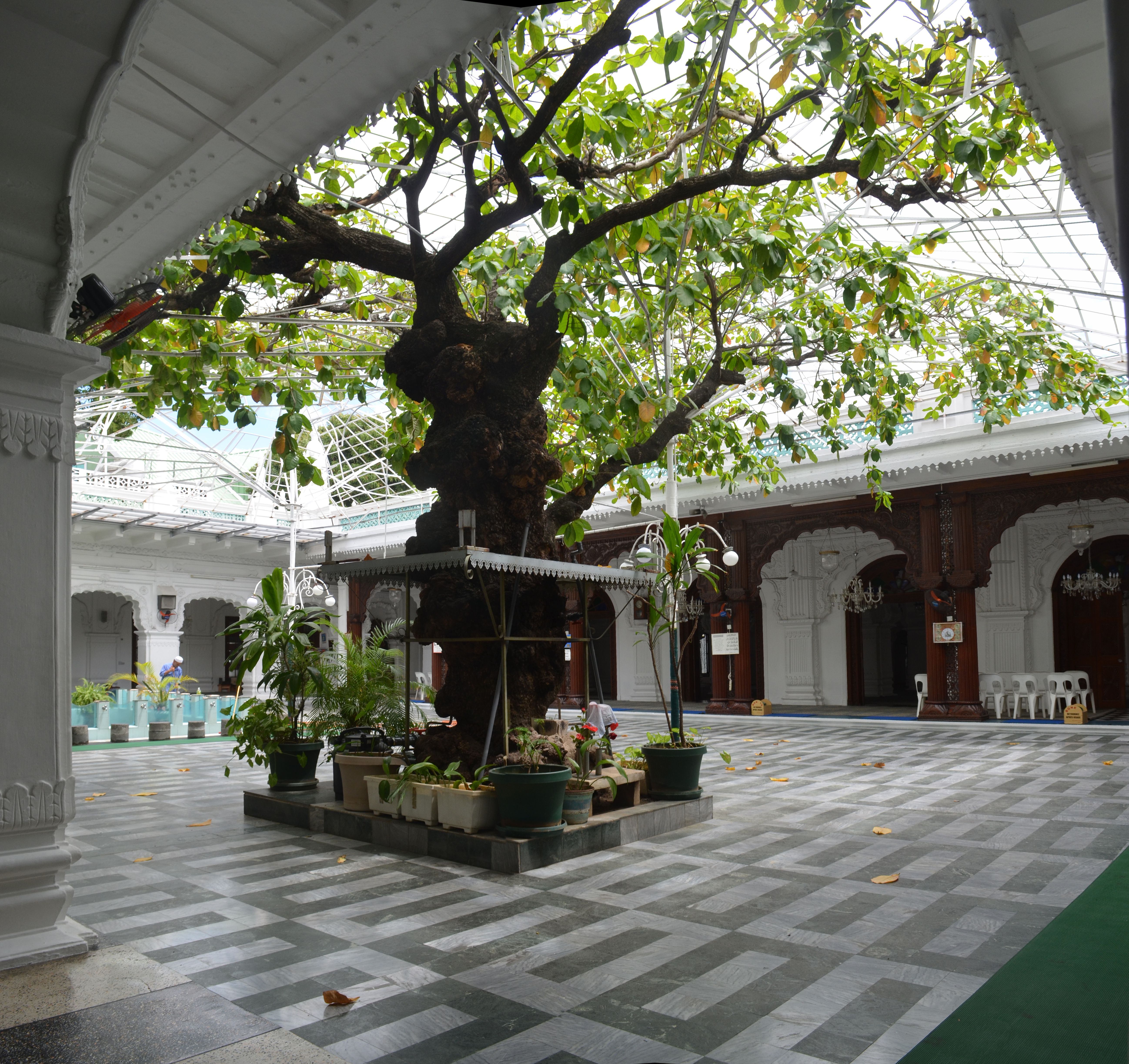 Port Louis, Jummah Masjeed, interieur